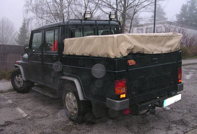 Mahindra-Geländewagen mit Doppelkabine in Stolberg neben der Franziskuskirche. Leider war die vorher im Regen benutzte Kamera verschmutzt, so daß unschöne Flecken die Aufnahme entwerten. Da es aber noch keine anderen Bilder dieses Typs gab, habe ich das Foto trotzdem hochgeladen. Hoffentlich begegnet mir das Fahrzeug noch einmal. Leider war die vorher im Regen benutzte Kamera verschmutzt, so daß unschöne Flecken die Aufnahme entwerten. Da es aber noch keine anderen Bilder dieses Typs gab, habe ich das Foto trotzdem hochgeladen. Hoffentlich begegnet mir das Fahrzeug noch einmal.